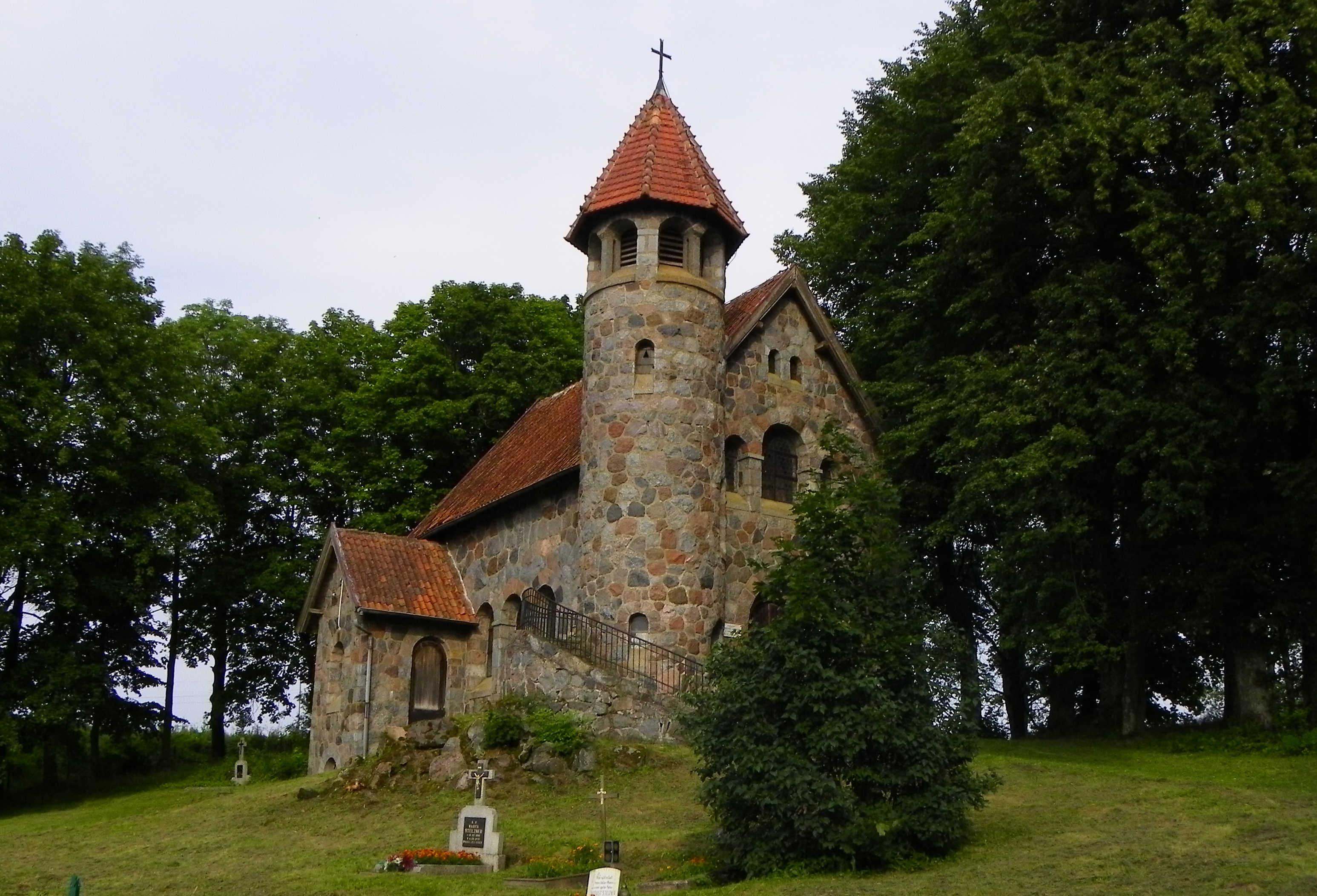 Kościół ewangelicko-augsburski w Raszągu (zabytek nr rejestr. A-4135)